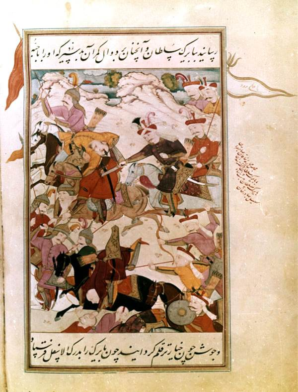 Muin Müsəvvir. “Tarix-i aləmaray-i Şah İsmayıl” əsərində Səfəvi bayraqları.